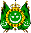 Stemma del Regno d'Egitto